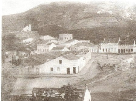 Município do Brejo da Madre de Deus, Pernambuco.